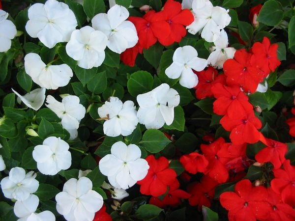 Busy Lizzie picture